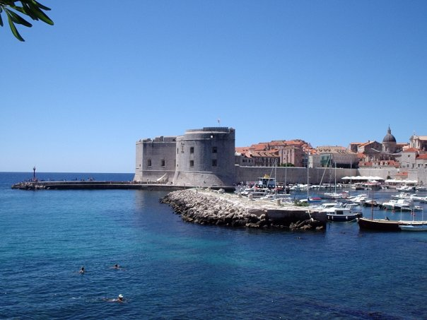 Tvrđava Sv. Ivan i lukobran Kaše, Dubrovnik, Hrvatska